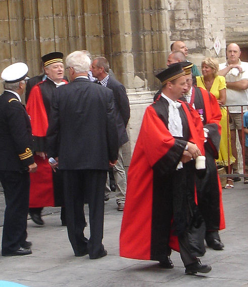 Magistraten tijdens de Nationale feestdag van België